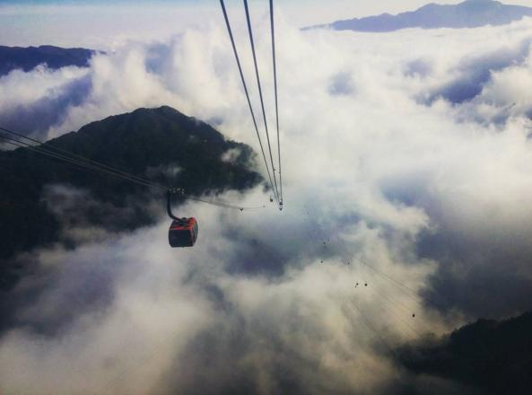 cáp treo